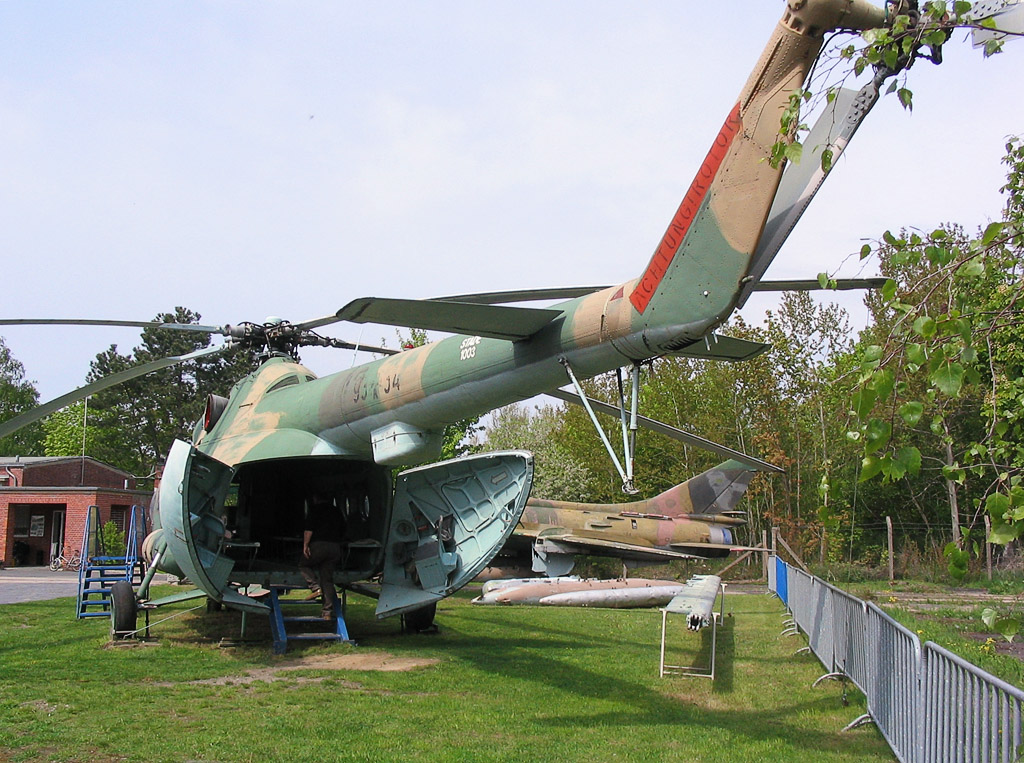 Beschreibung: Mil Mi-8T (Hip) Fotograf: Darkone, 14. Mai 2005